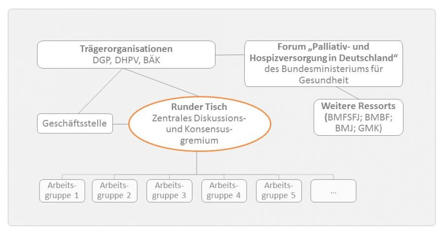 Nationale Strategie Organigramm